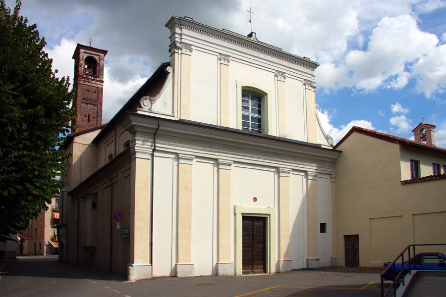 Facciata della chiesa (con annesso convento) di San Francesco a Trecate (NO)